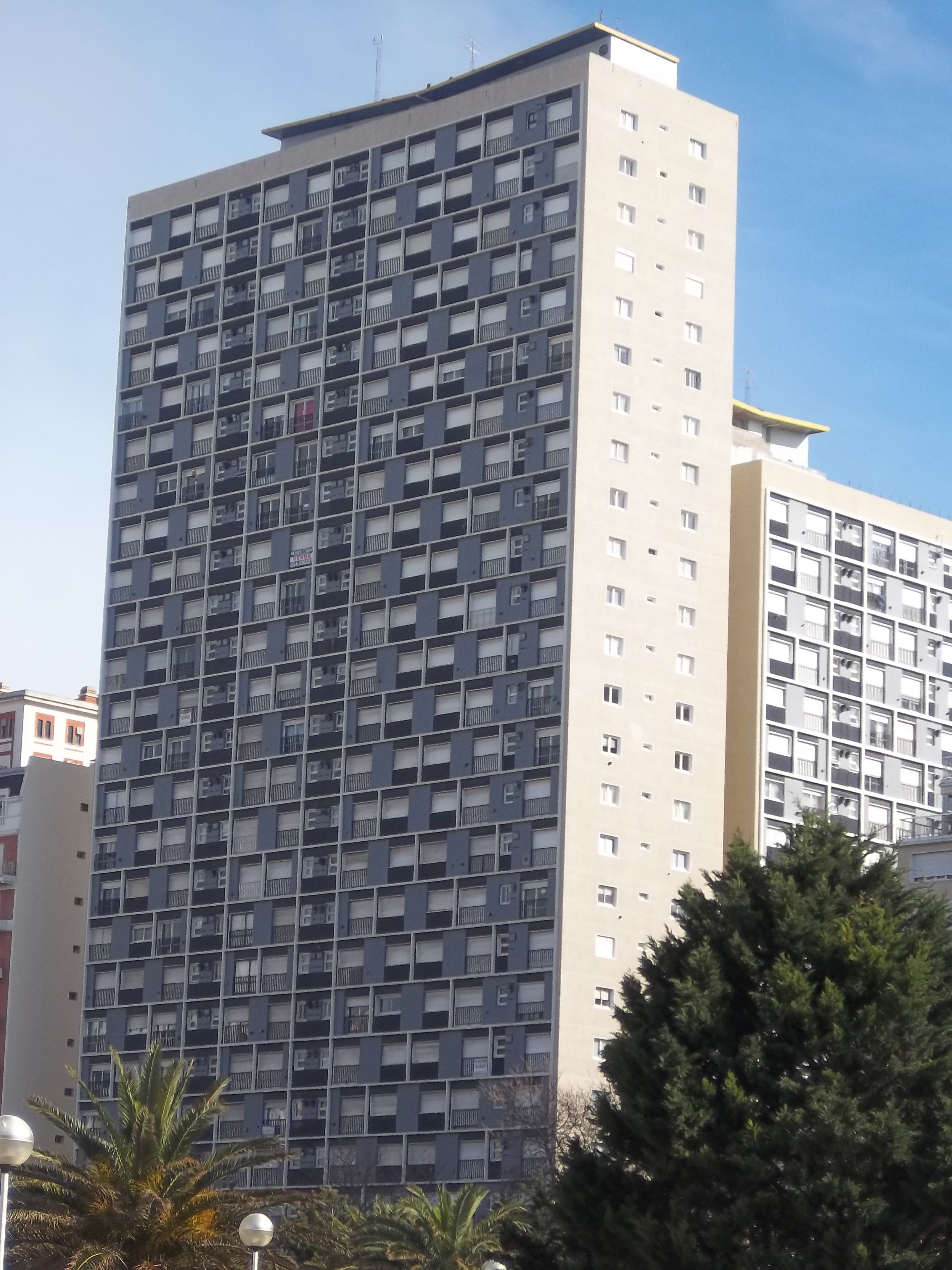 Edificio Palacio Edén en Mar del Plata, provincia de Buenos Aires, Argentina.